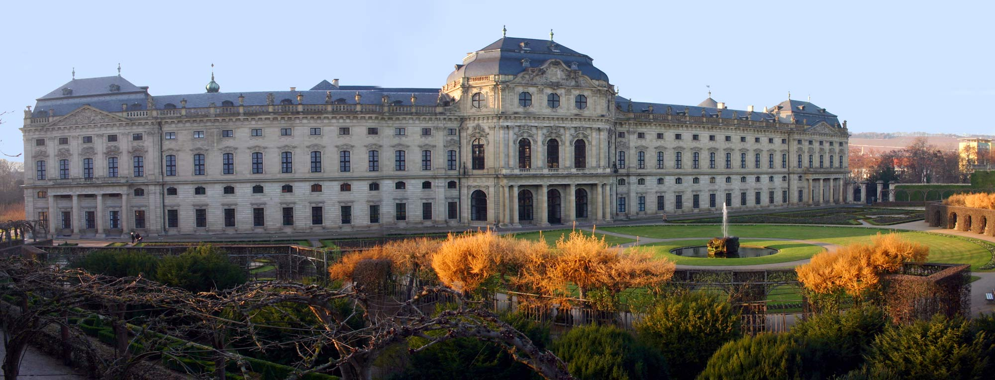 Beschreibung: Residenz Würzburg, Ansicht Hofgarten Quelle: selbst fotografiert Fotograf: Christian "VisualBeo" Horvat Datum: 29.11.2004 Foto: Canon EOS 300D Lizenzstatus: GNU Bilde:Residenz Wuerzburg Hofgarten.jpg